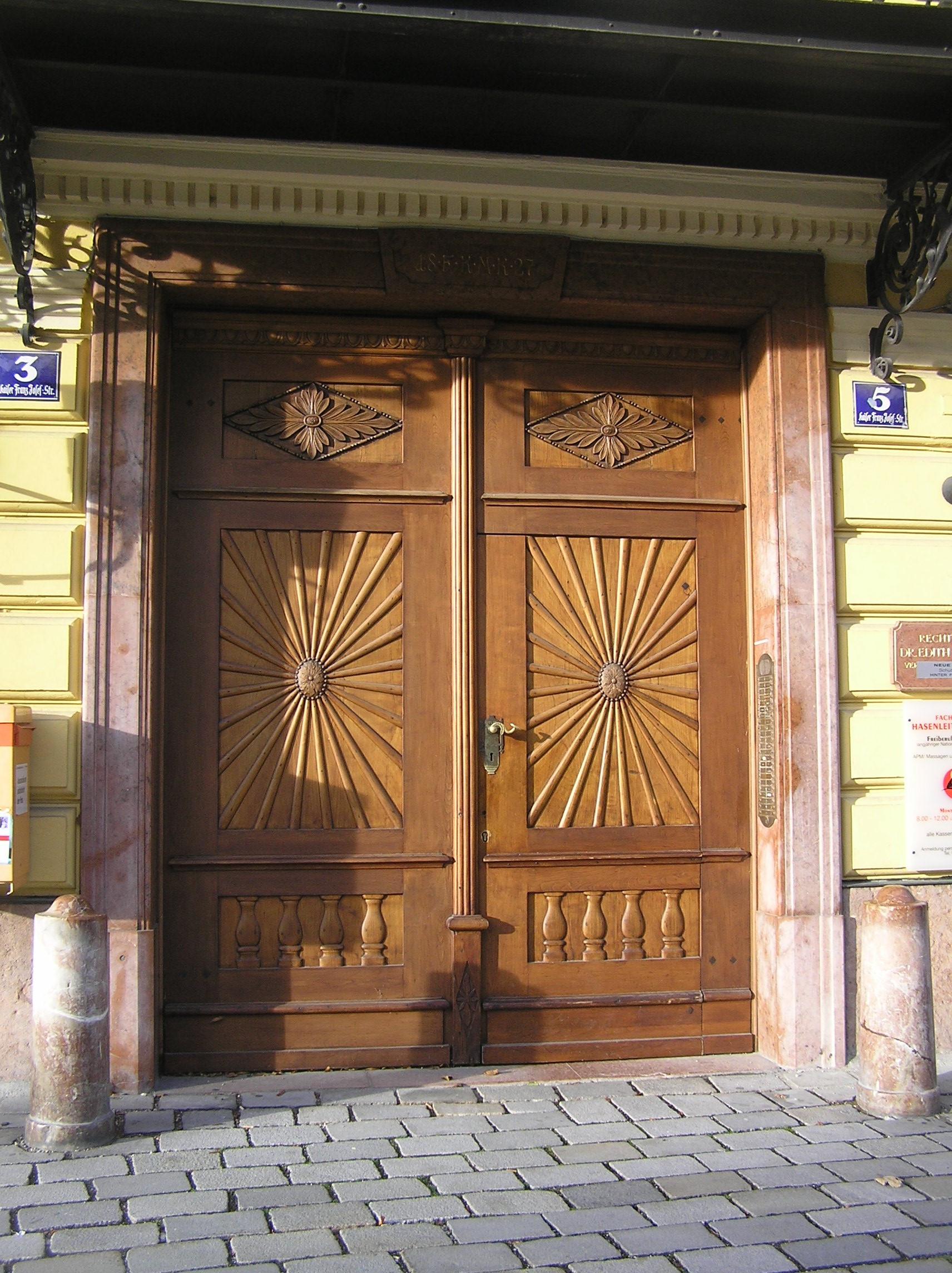 Portal des ehemaligen Hotel Post in Bad Ischl, Oberösterreich. Selbst fotografiert am 11.11.2006 durch Dr. Wolfgang Perr